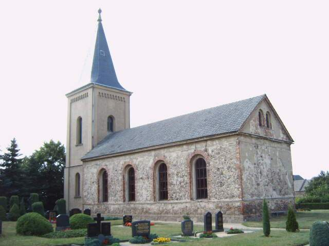 Kirche des Dorfes Hindenberg (Lübbenau), Land Brandenburg, Deutschland Bild aufgenommen von Olaf Meister am 27.6.2006